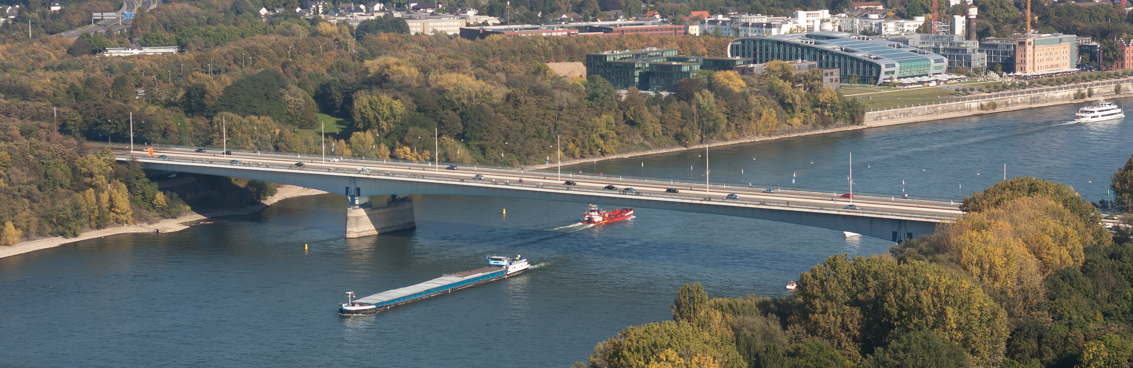 Konrad-Adenauer-Brücke, die südliche der Bonner Rheinbrücken, vom Post Tower aus gesehen mit Blick auf die Bebauung des Bonner Bogens mit dem Kameha Grand Hotel und der Rohmühle